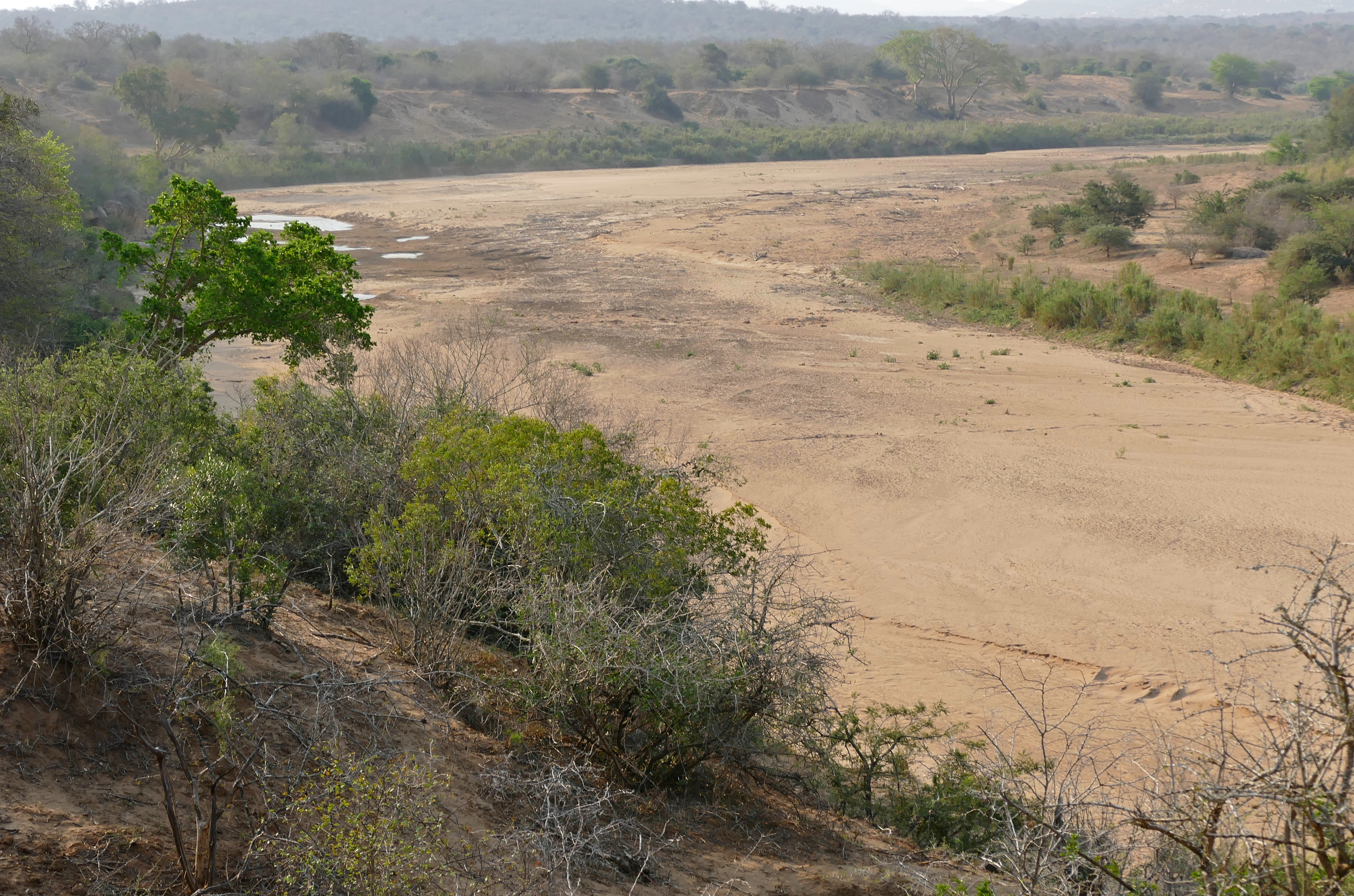 Sontuli Loop, iMfolozi Game Reserve, Hluhluwe-iMfolozi Park, Kwazulu-Natal, SOUTH AFRICA